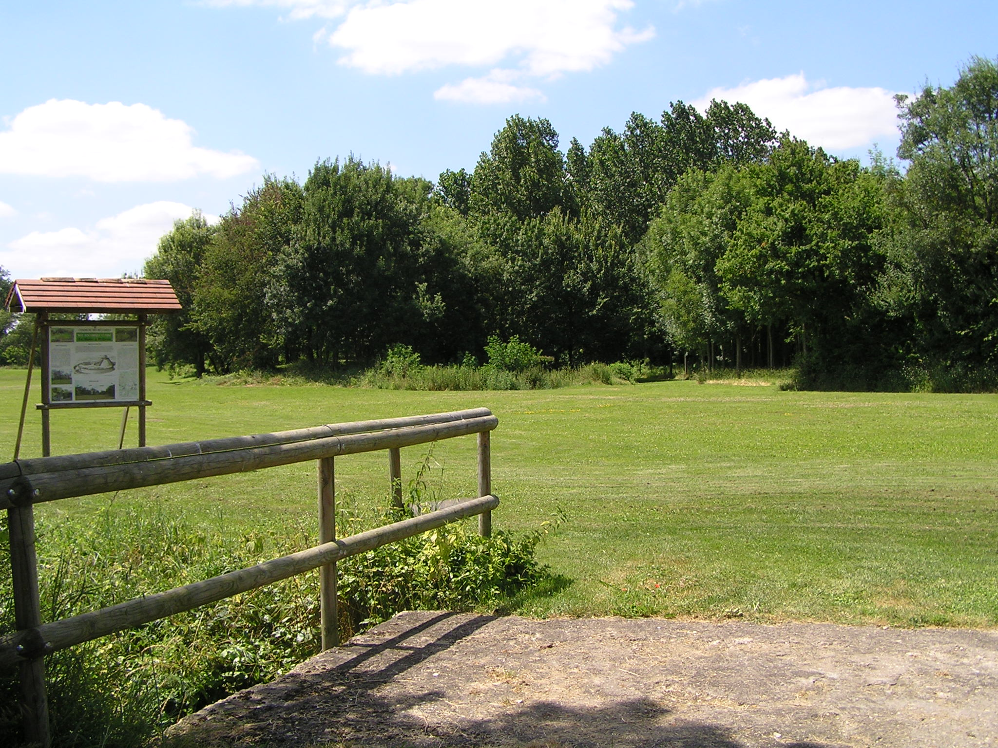 motte antique